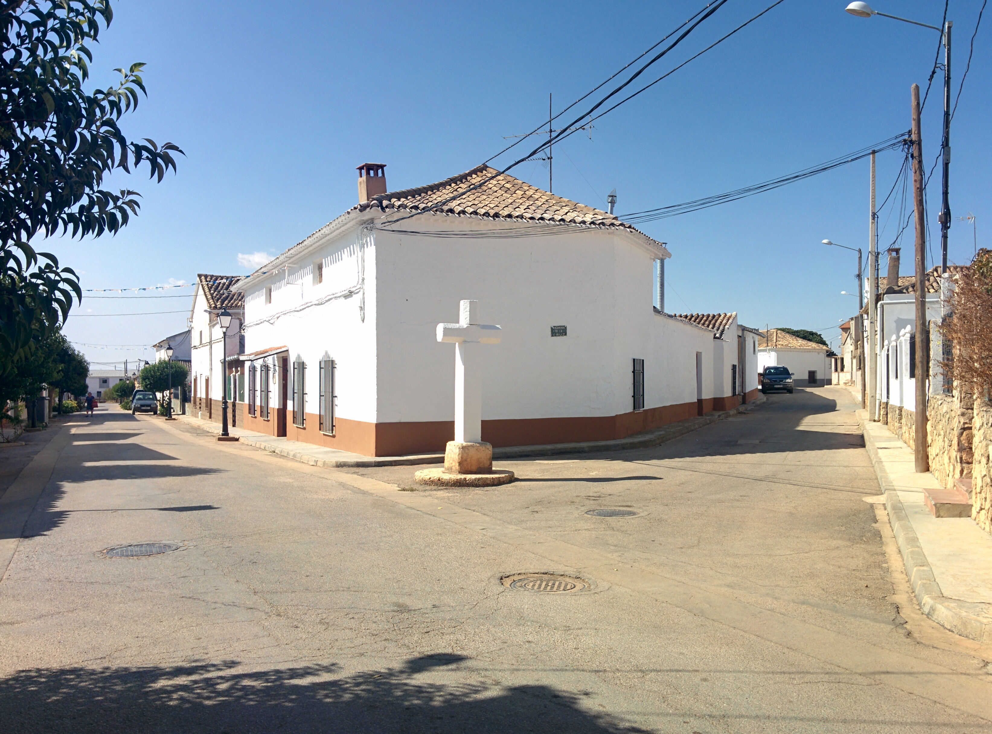 Calle de la Cruz, en Casas de Guijarro (Cuenca, España).